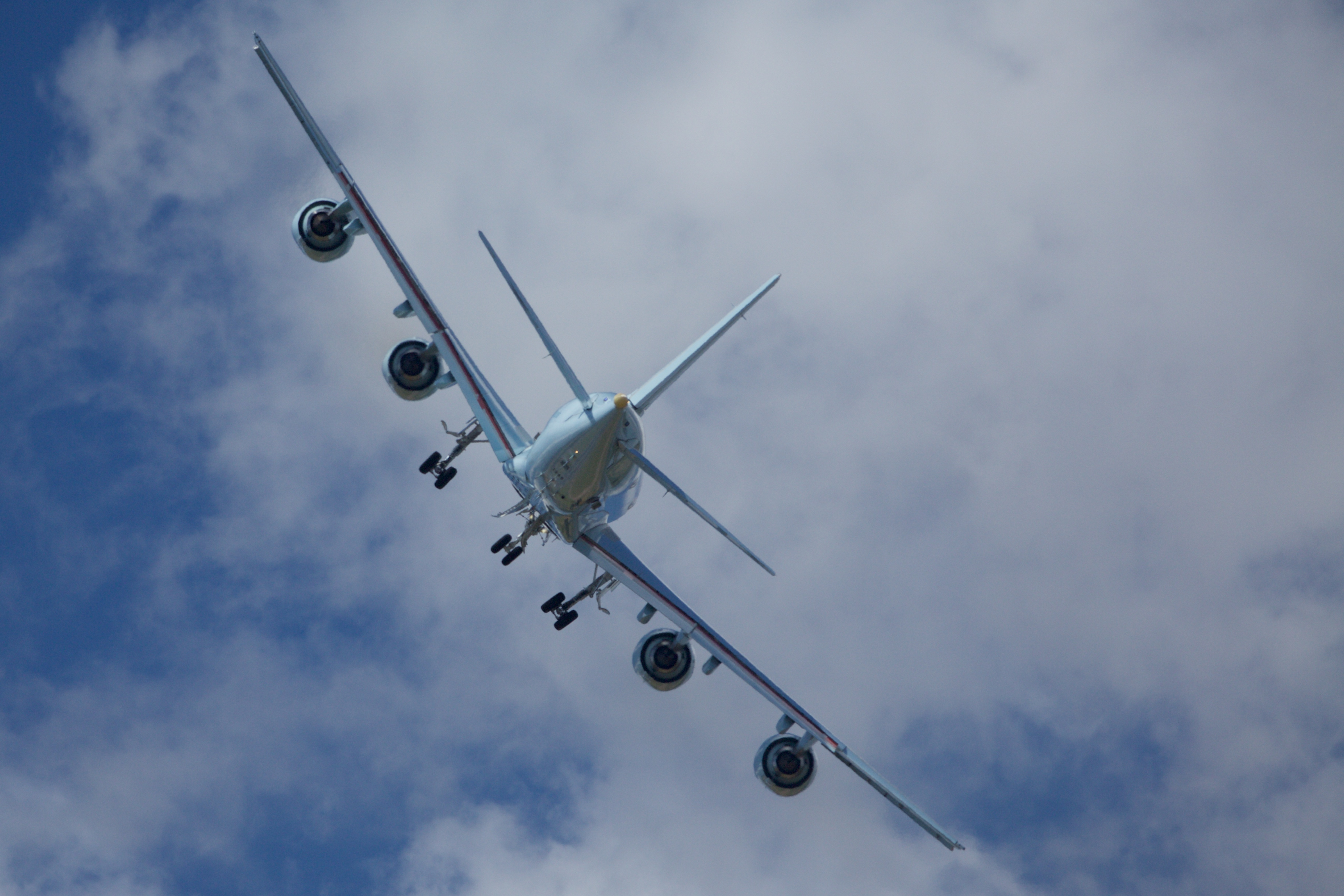 Kawasaki P-1